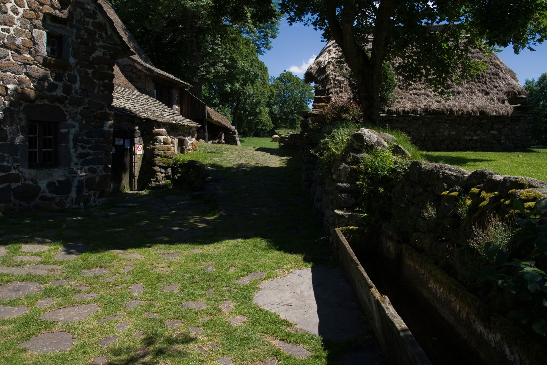 Ferme des frères Perrel